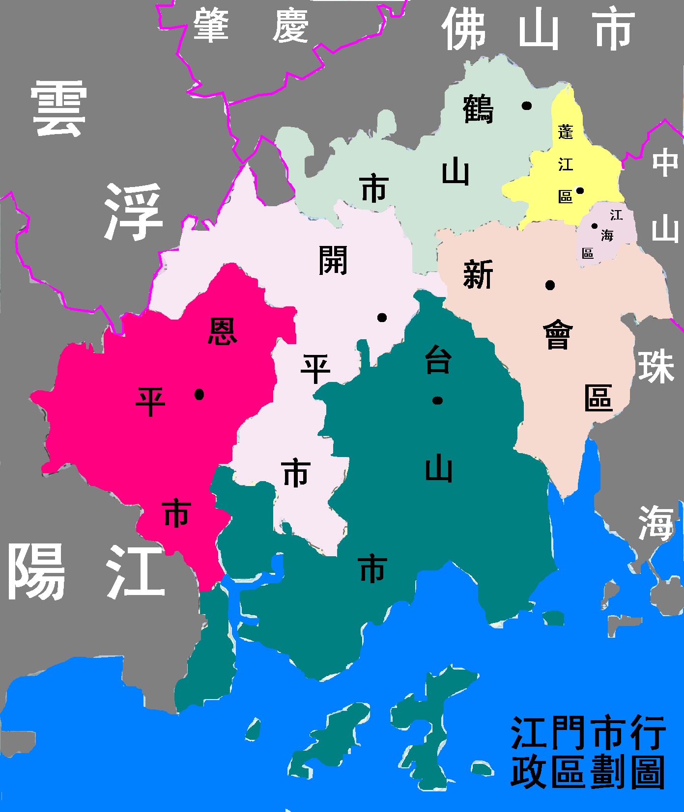 江门市行政区划图